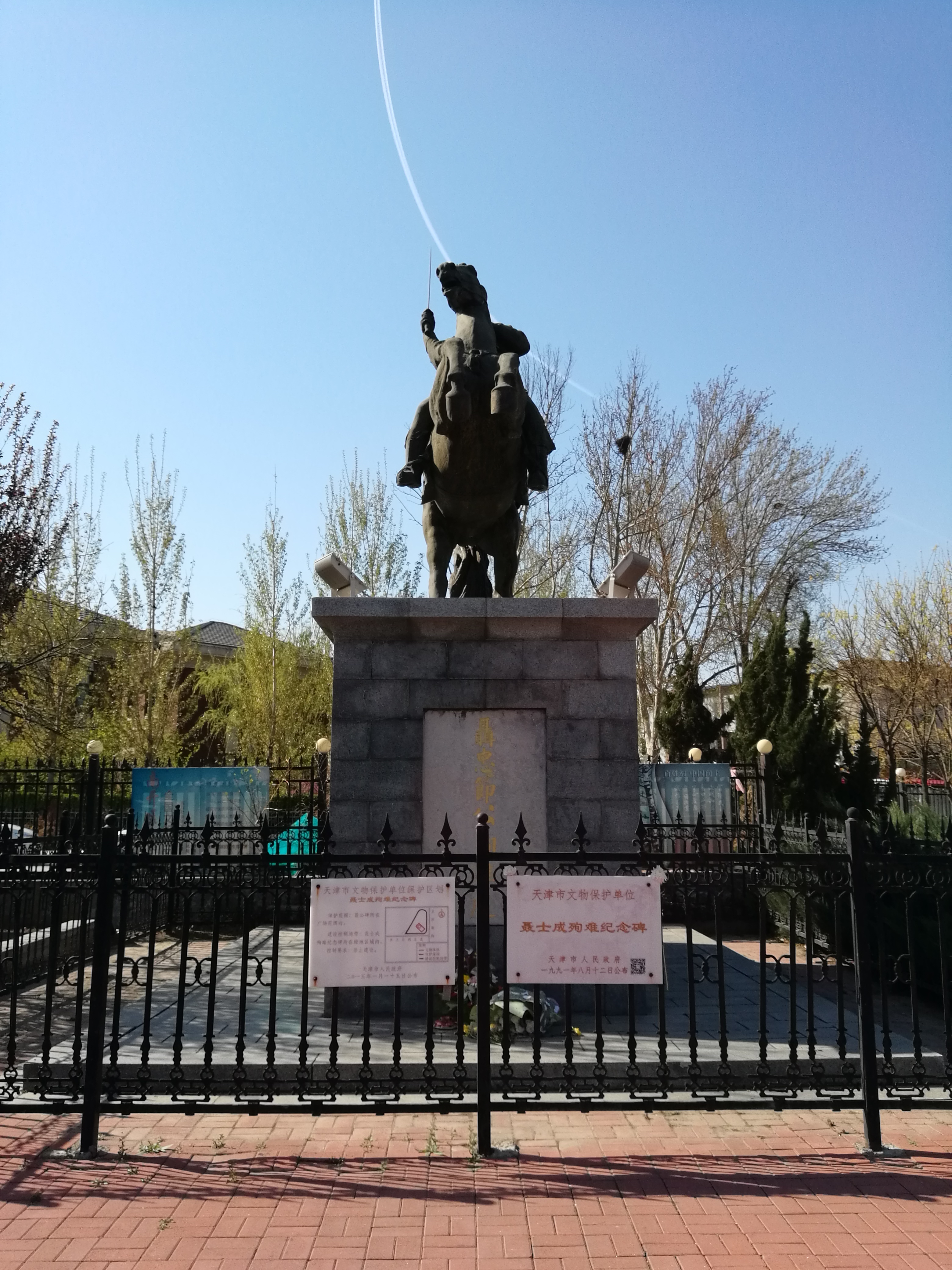 聂士诚烈士殉难纪念碑